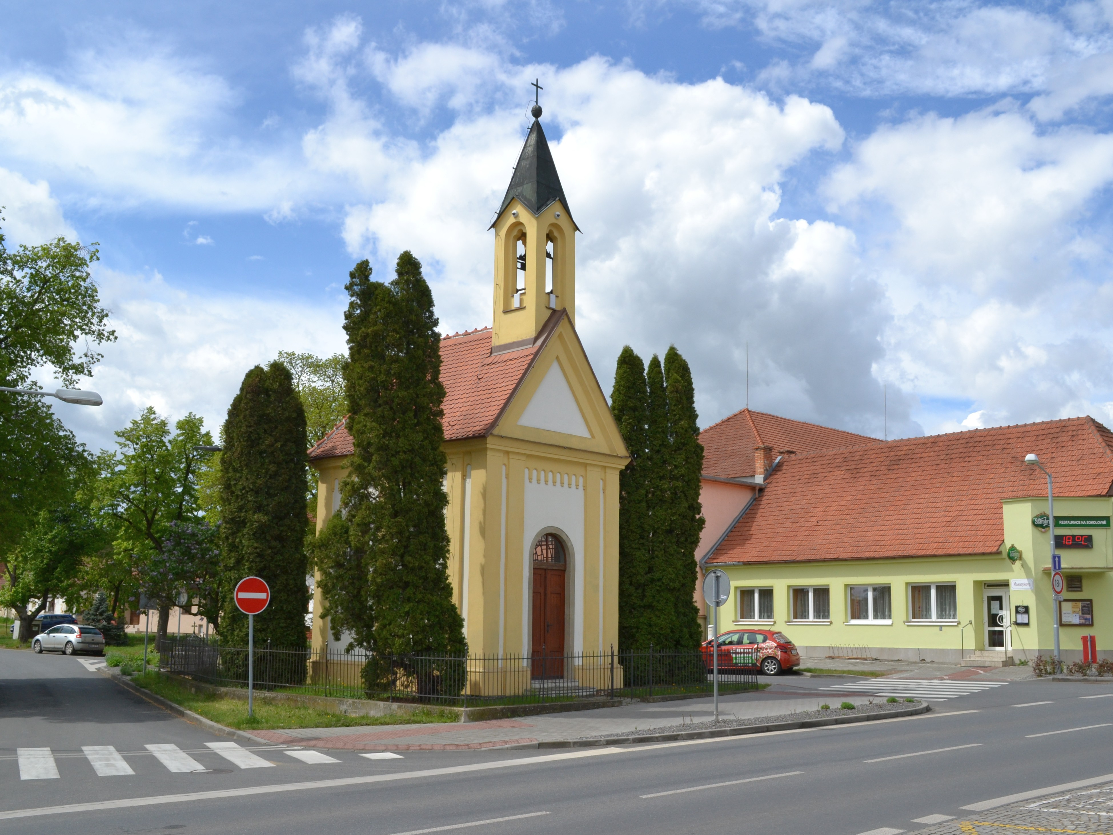 Sokolnice - kaple sv. Václava.